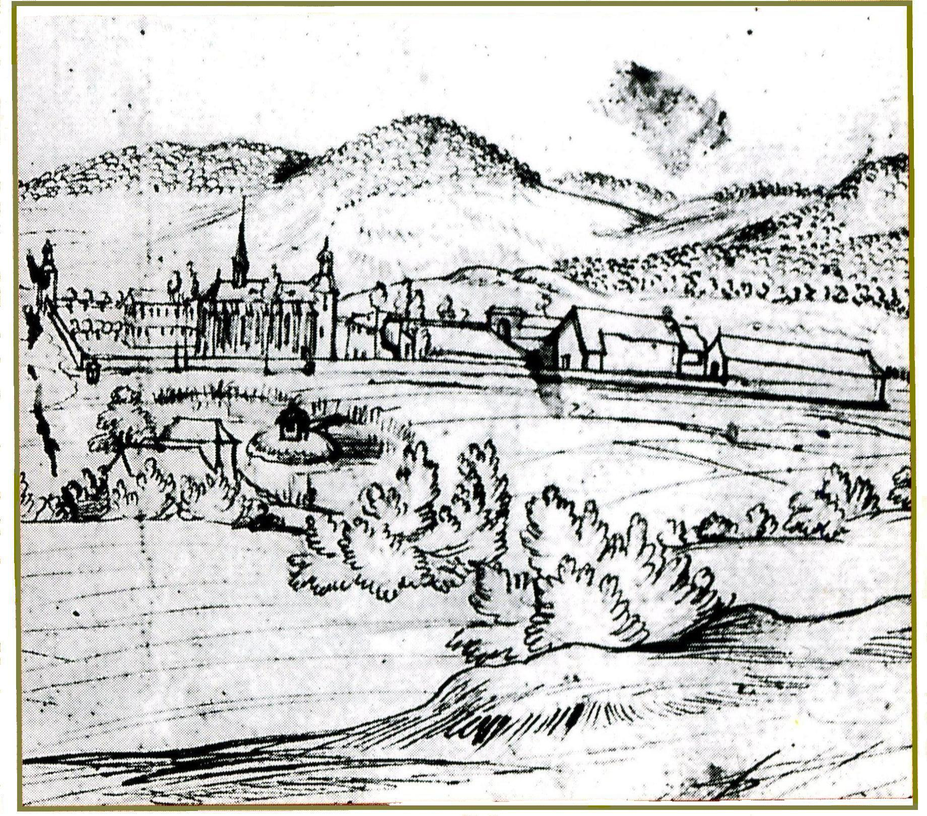 Kloster Glindfeld (Hochsauerlandkreis, Deutschland) 1720